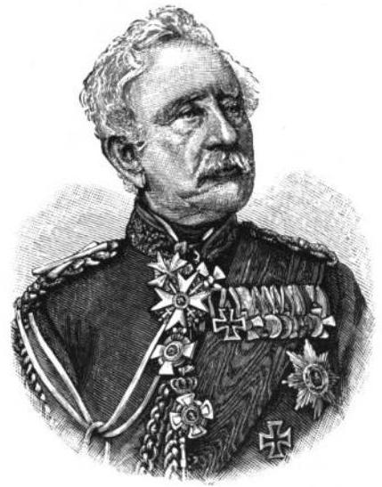 1895 illustration of Karl Friedrich von Steinmetz.